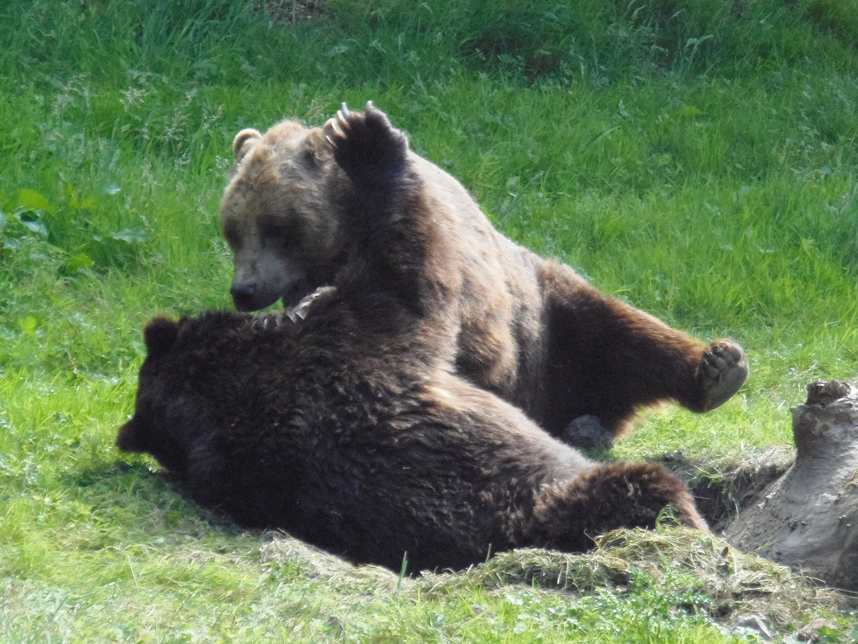 Jeux entre deux ours, au parc zoologique Cerza, à Hermival-les-Vaux (Normandie, France).